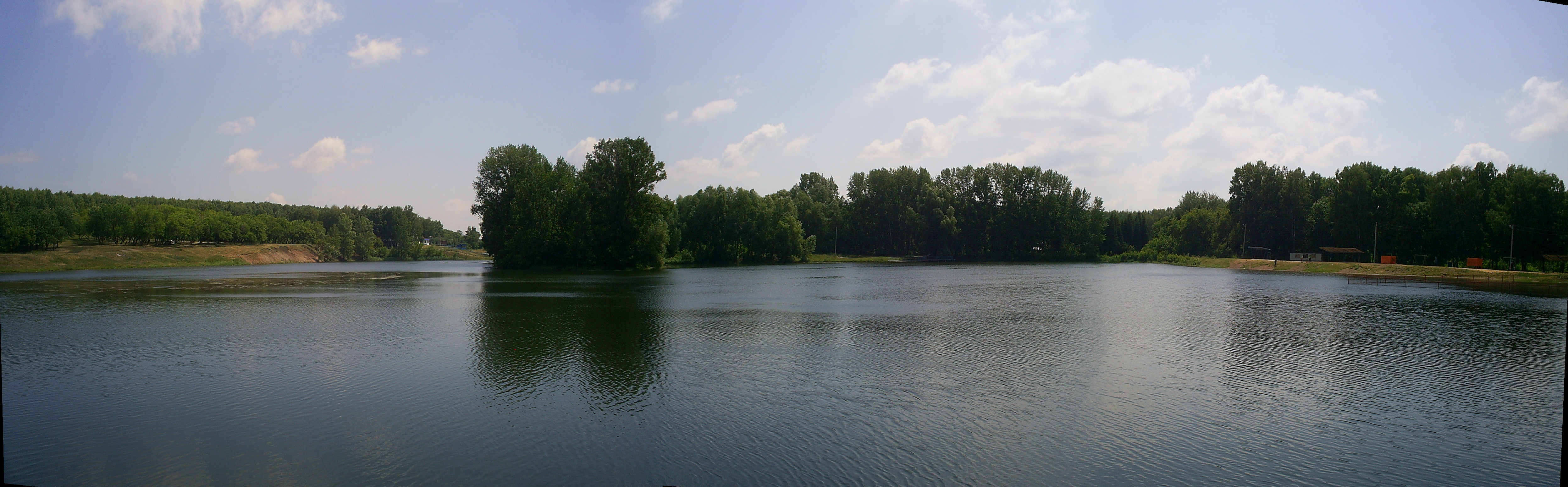 Пруд Тайрук, 12.07.2009 (Панорама)